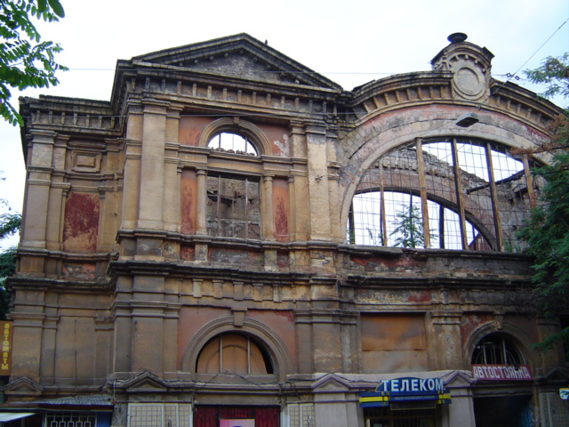 Odessa, Ukraine